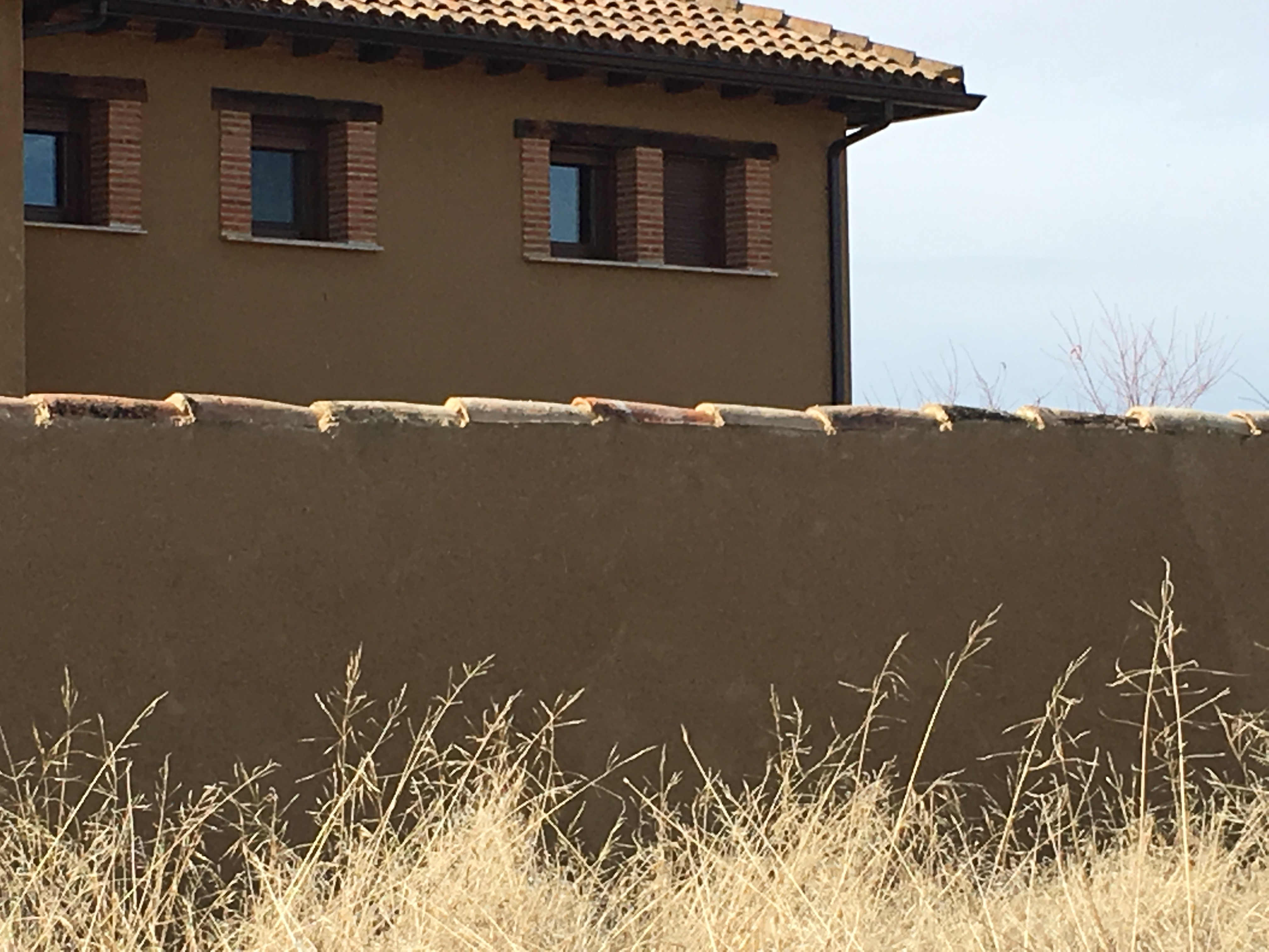 Villaesper Milenario